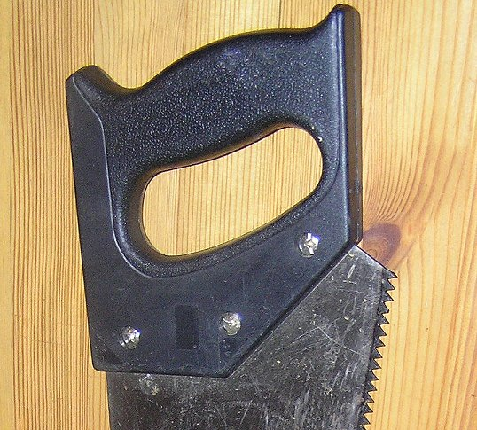 Handsaw